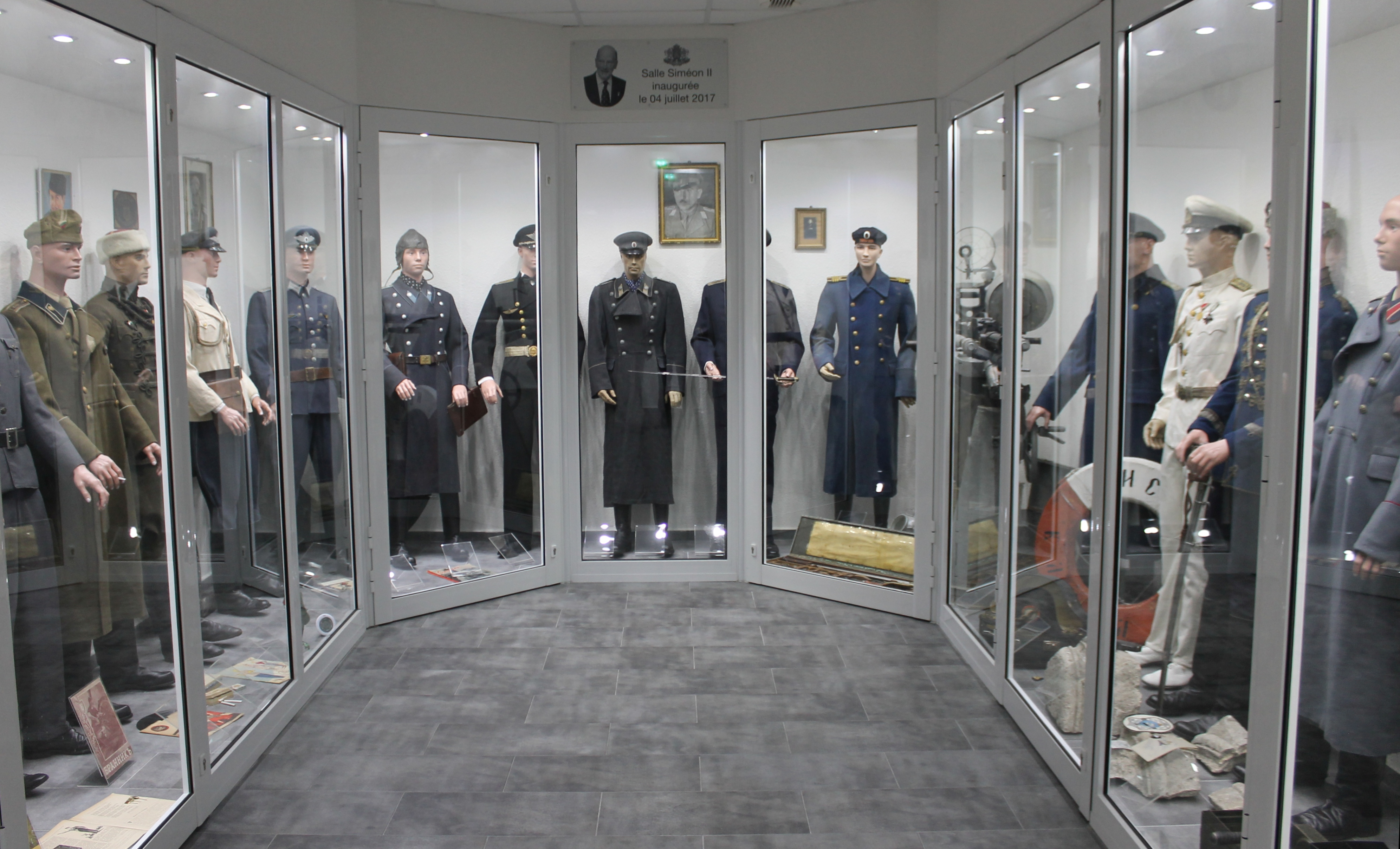 MM Parc France, Salle Simeon II